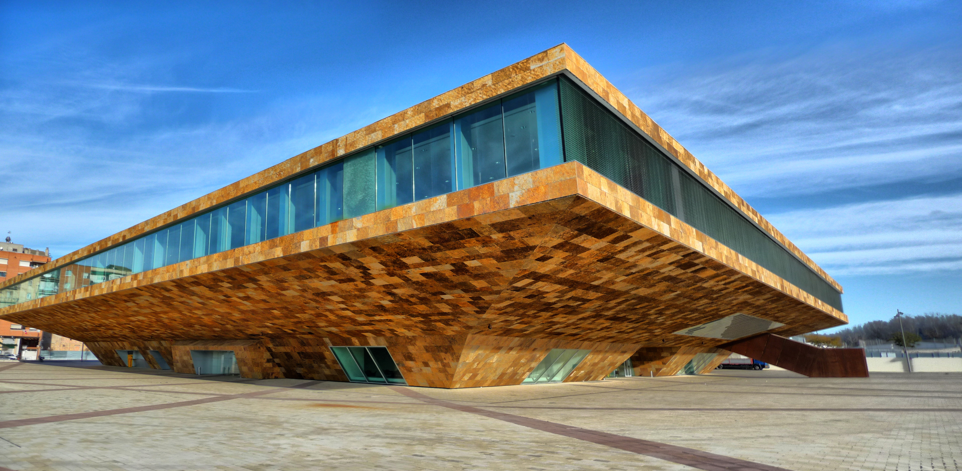 Llotja. Lleida